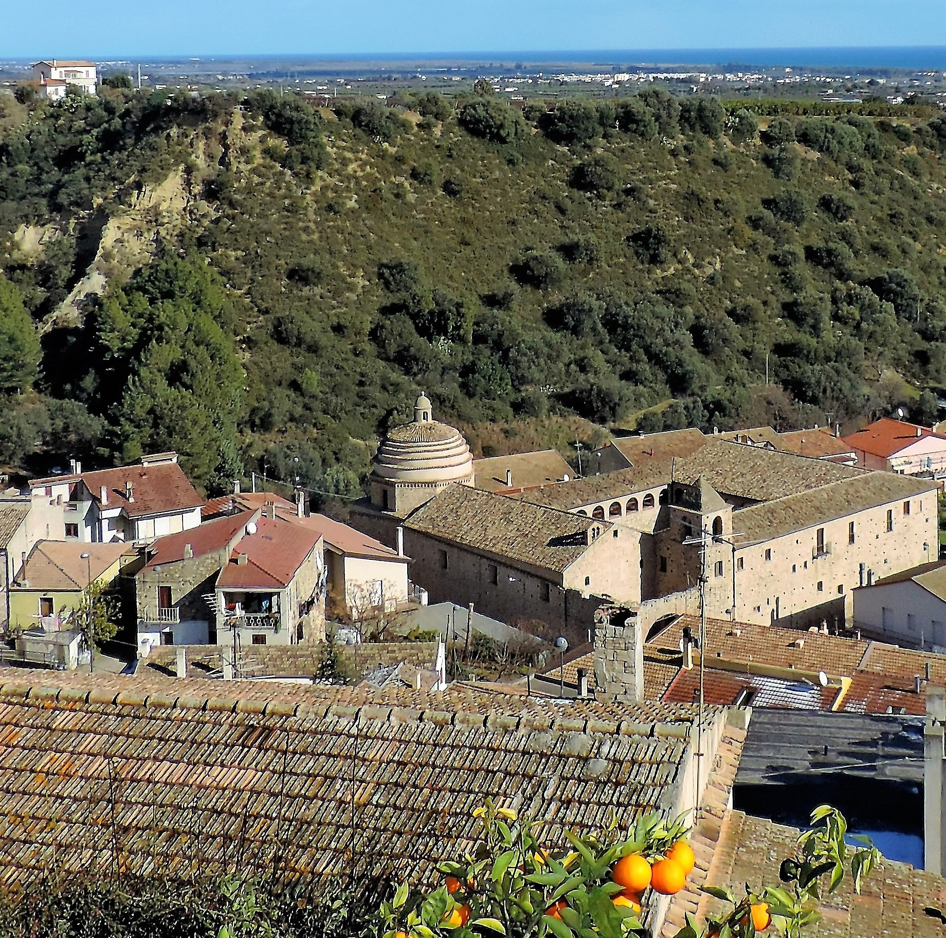 Il convento visto dal belvedere della Chiesa Madre